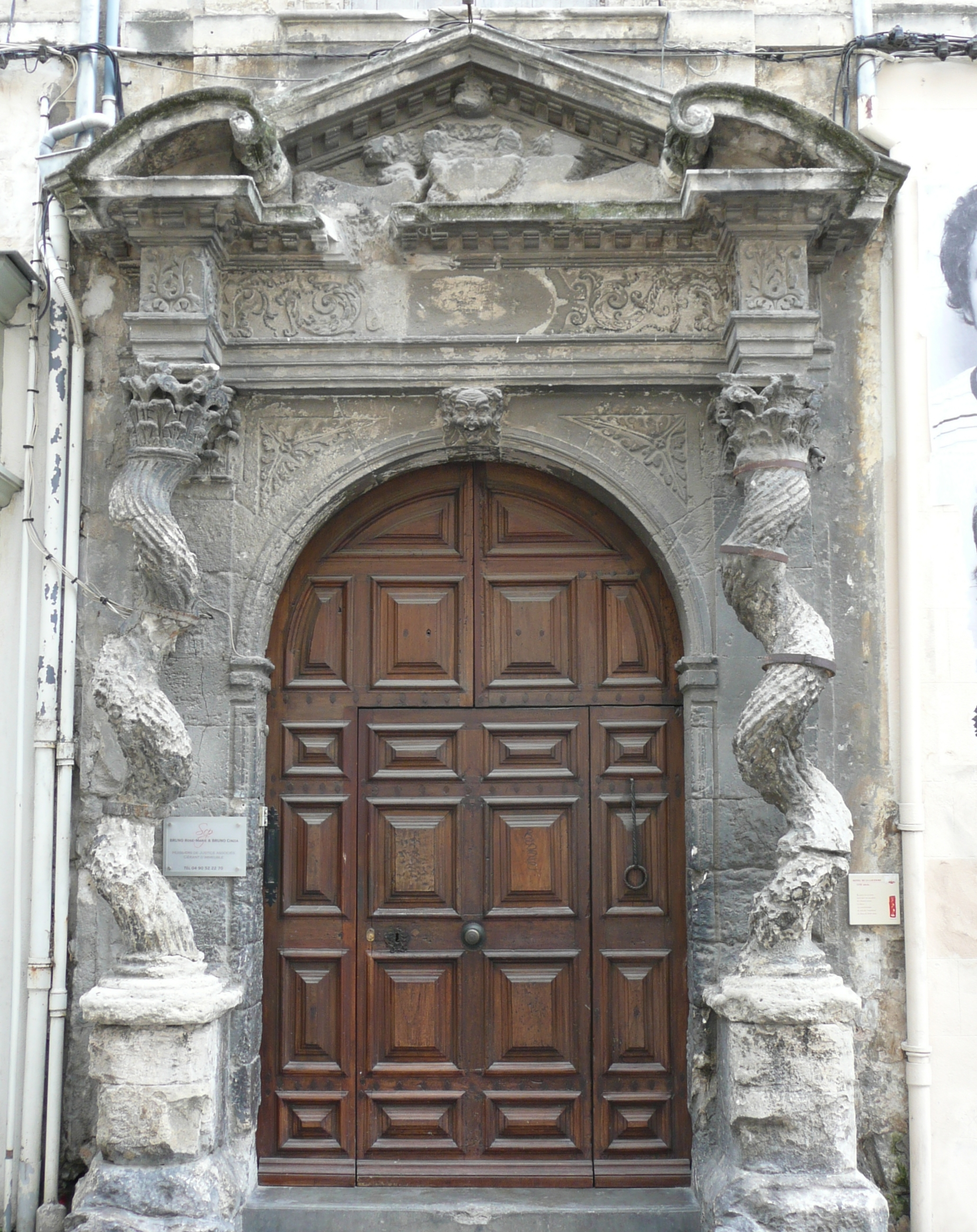 Au 42 rue de la République, Arles (13), hôtel particulier Noble de la Lauzière, porte d'architecture maniériste du début du 17e siècle caractérisée par son double fronton (un triangulaire appuyé sur un curviligne interrompu) reposant sur un entablement à frise décorée de rinceaux, soutenu par les deux célèbres colonnes torses cannelées à chapiteaux corinthiens, unique exemple arlésien en extérieur de ce décor que l'on ne retrouve à Arles que sur des retables d'église notamment à la Major.